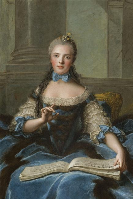 Jean-Marc Nattier (1685–1766): Mme Adélaïde de France (1732–1800), eine der vier unverheirateten Töchter Ludwigs XV., mit Musiknoten, 1758. Öl auf Leinwand, 2.325 x 1.65 m. Château de Versailles.